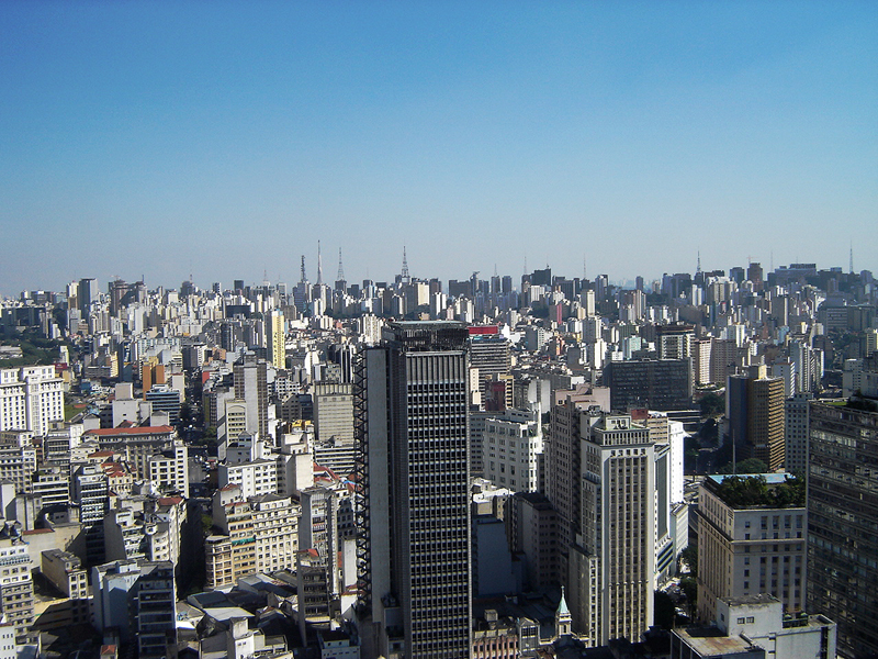 Centro de São Paulo.